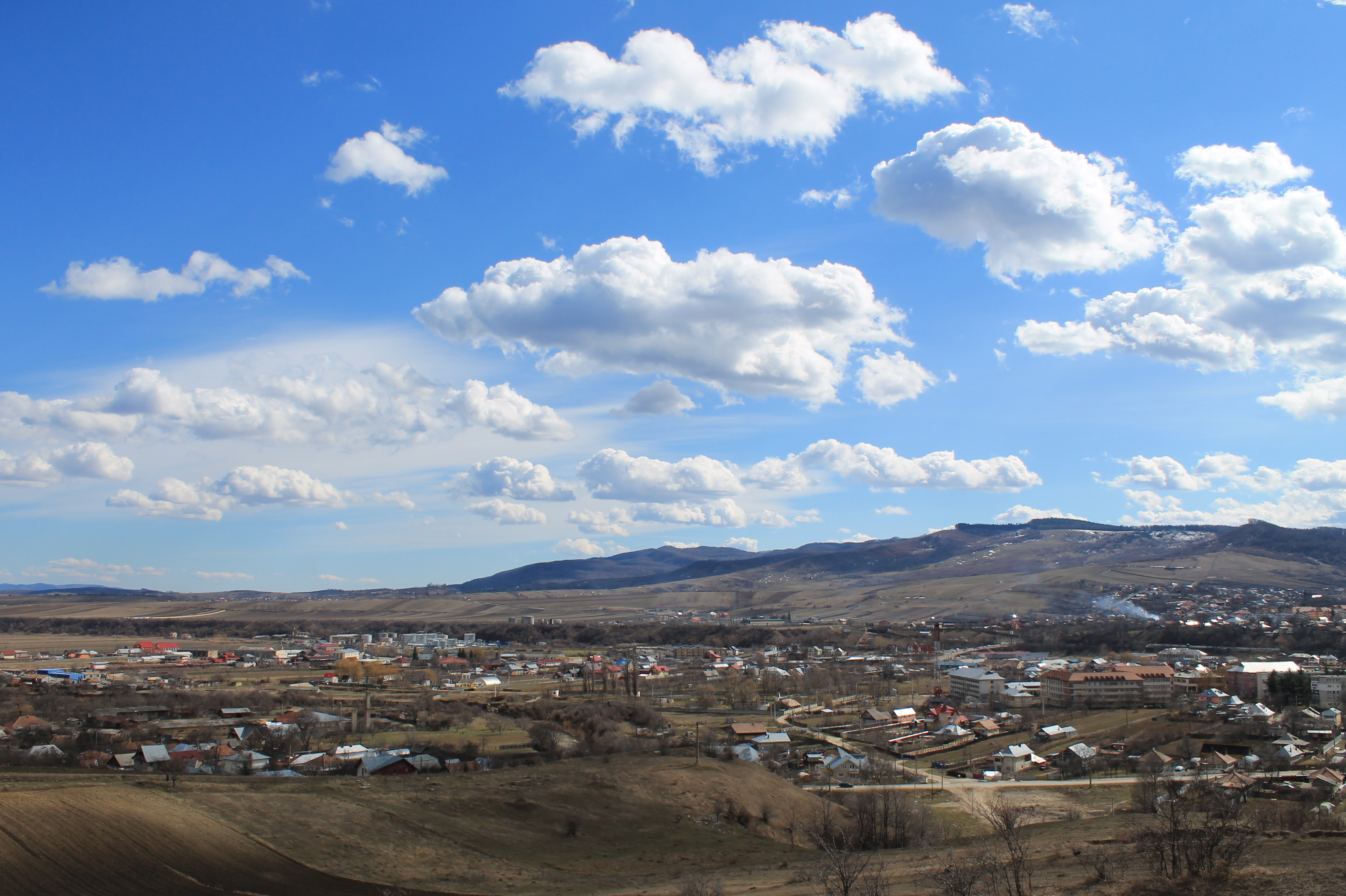 Panoramă a capătului dinspre Bacău a orașului Moinești